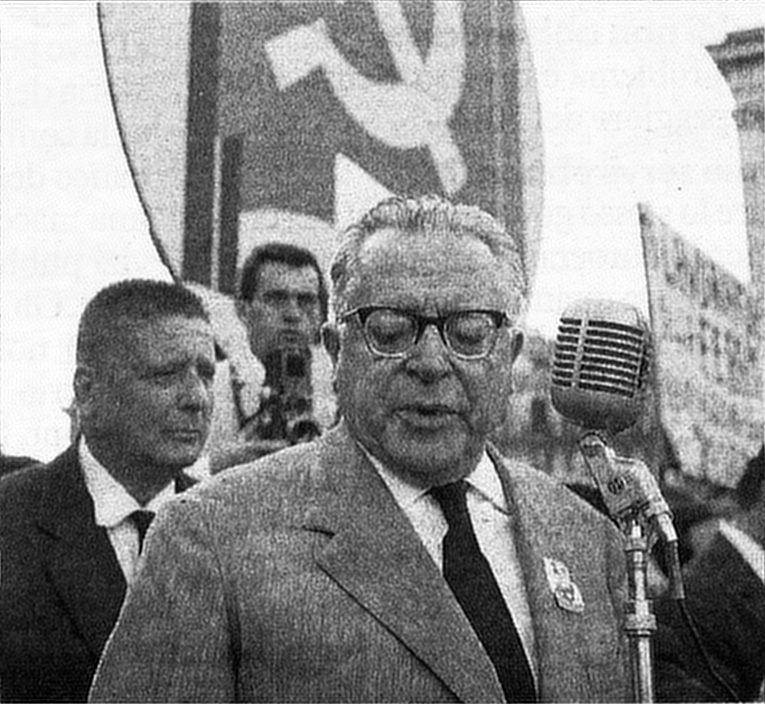 Il segretario del PCI Palmiro Togliatti durante un comizio